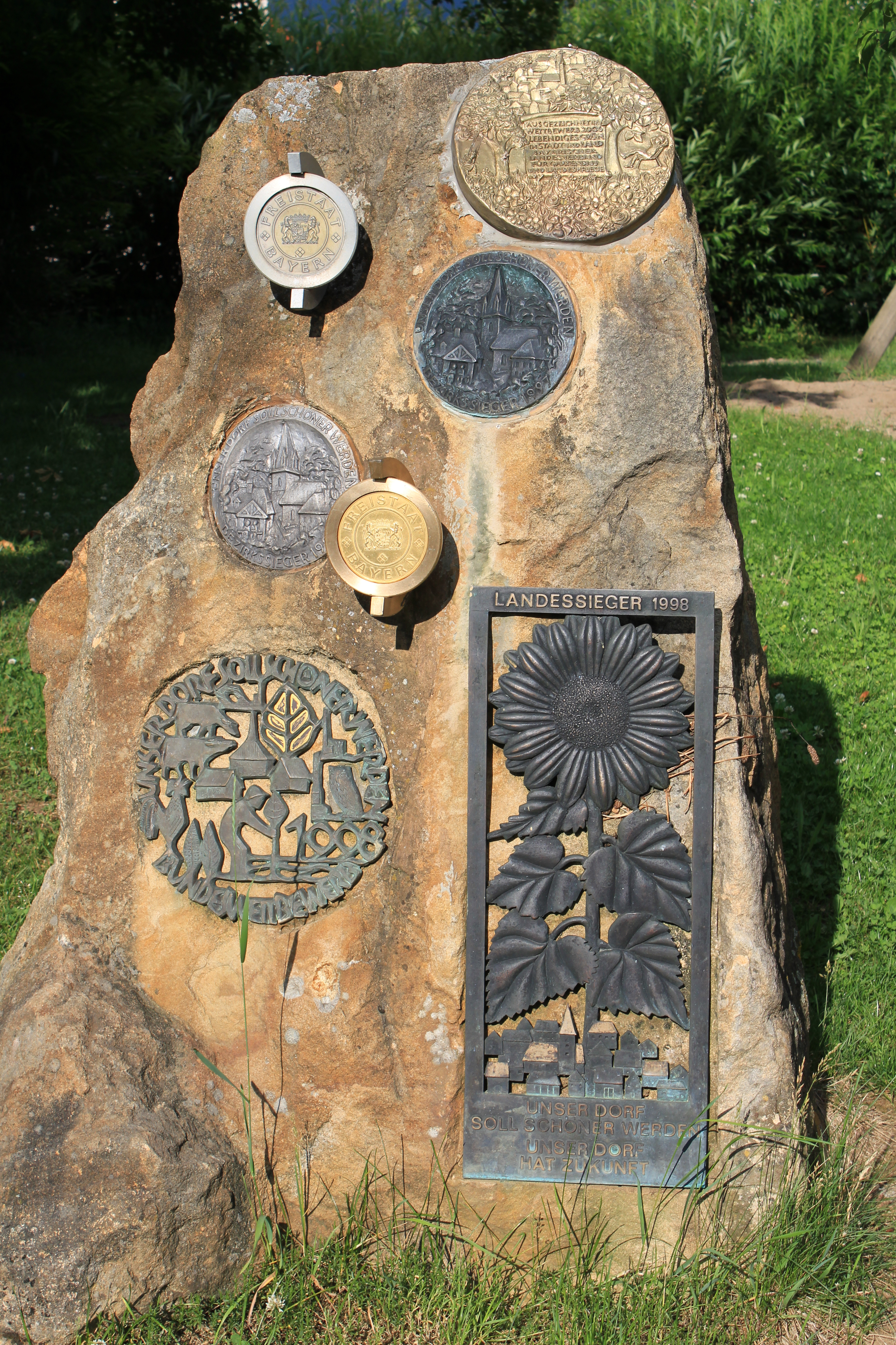 Sandsteinstele mit daran angebrachten Auszeichnungen diverser Dorfwettbewerbe in Burkheim, am Spielplatz.